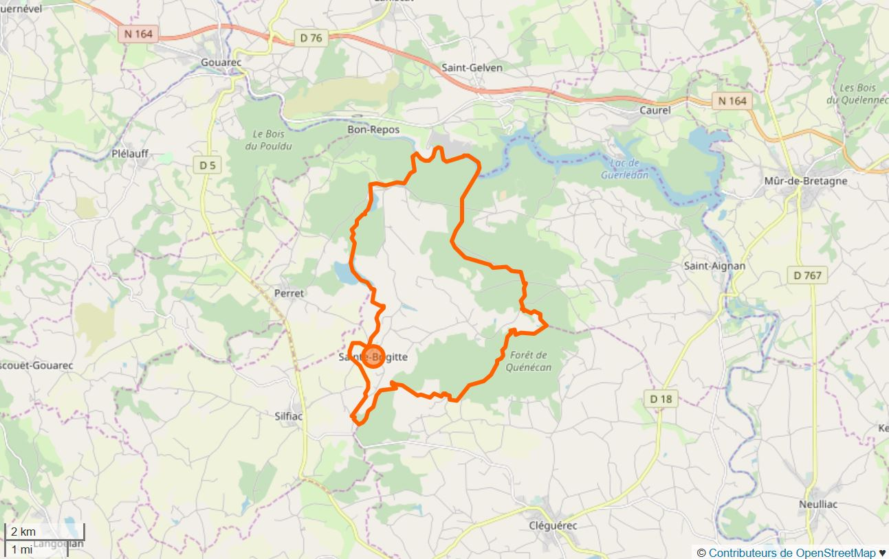 Cette carte a été créée à partir des données du site Openstreetmap. This map may be incomplete, and may contain errors. Don't rely solely on it for navigation.